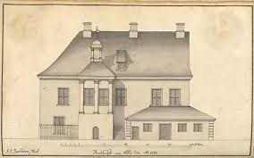 Foto på teckning av rådhuset i Bergen 1768